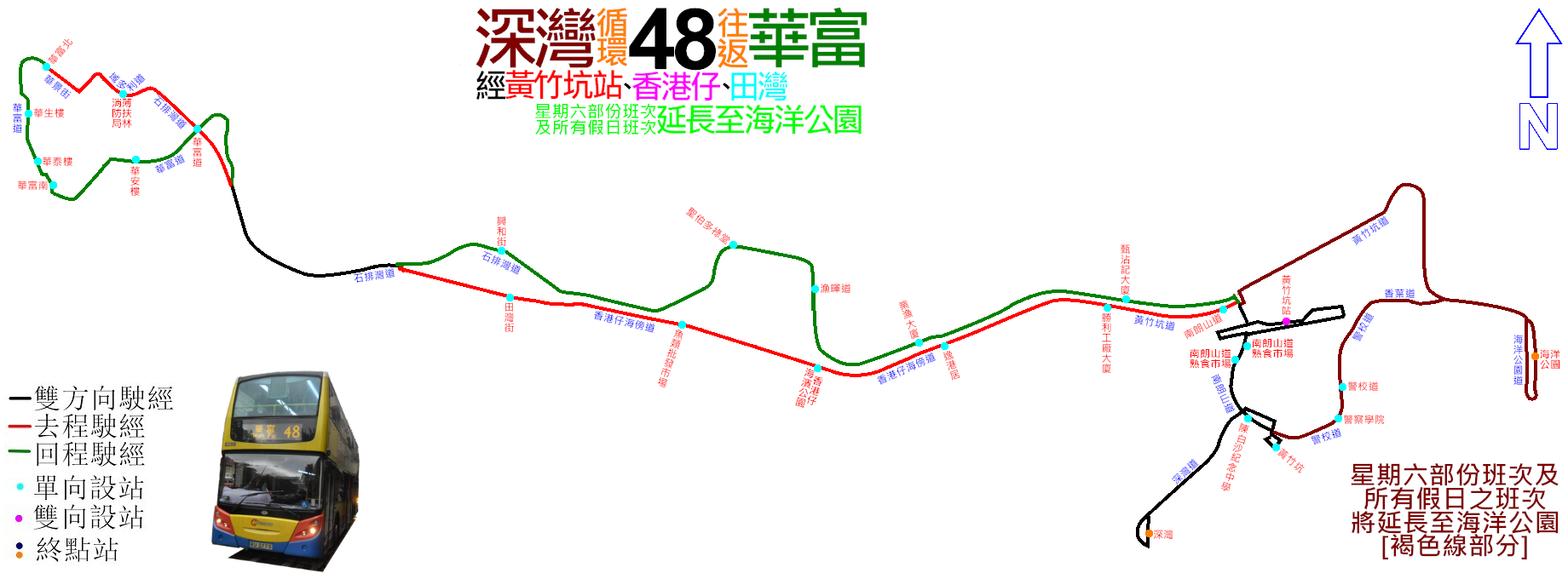 中文（香港）: 城巴48線的走線圖